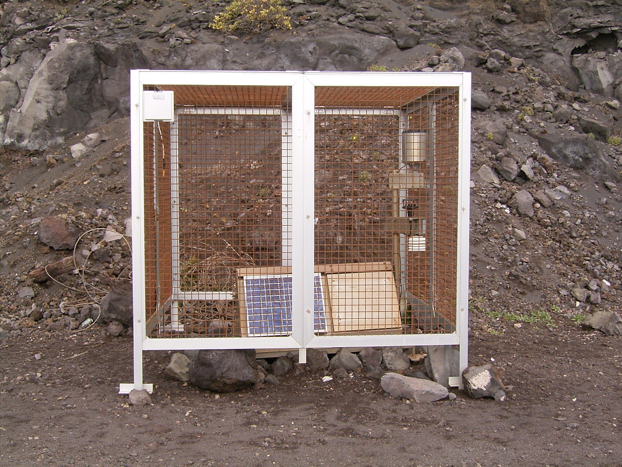 El Faro in Fuencaliente, La Palma, Canary Islands